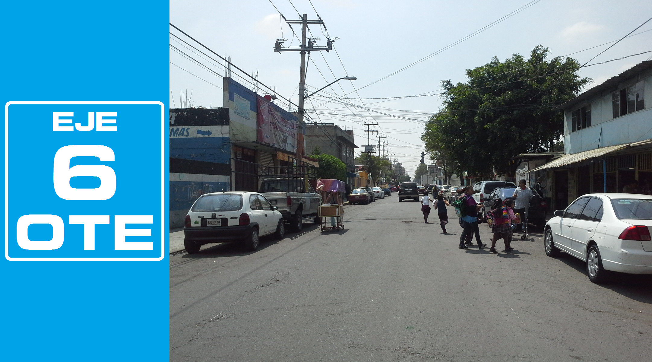 Rediseñado original de la señalética de los Ejes viales de la Ciudad de México por José García (Wiki ID: narumiyama)